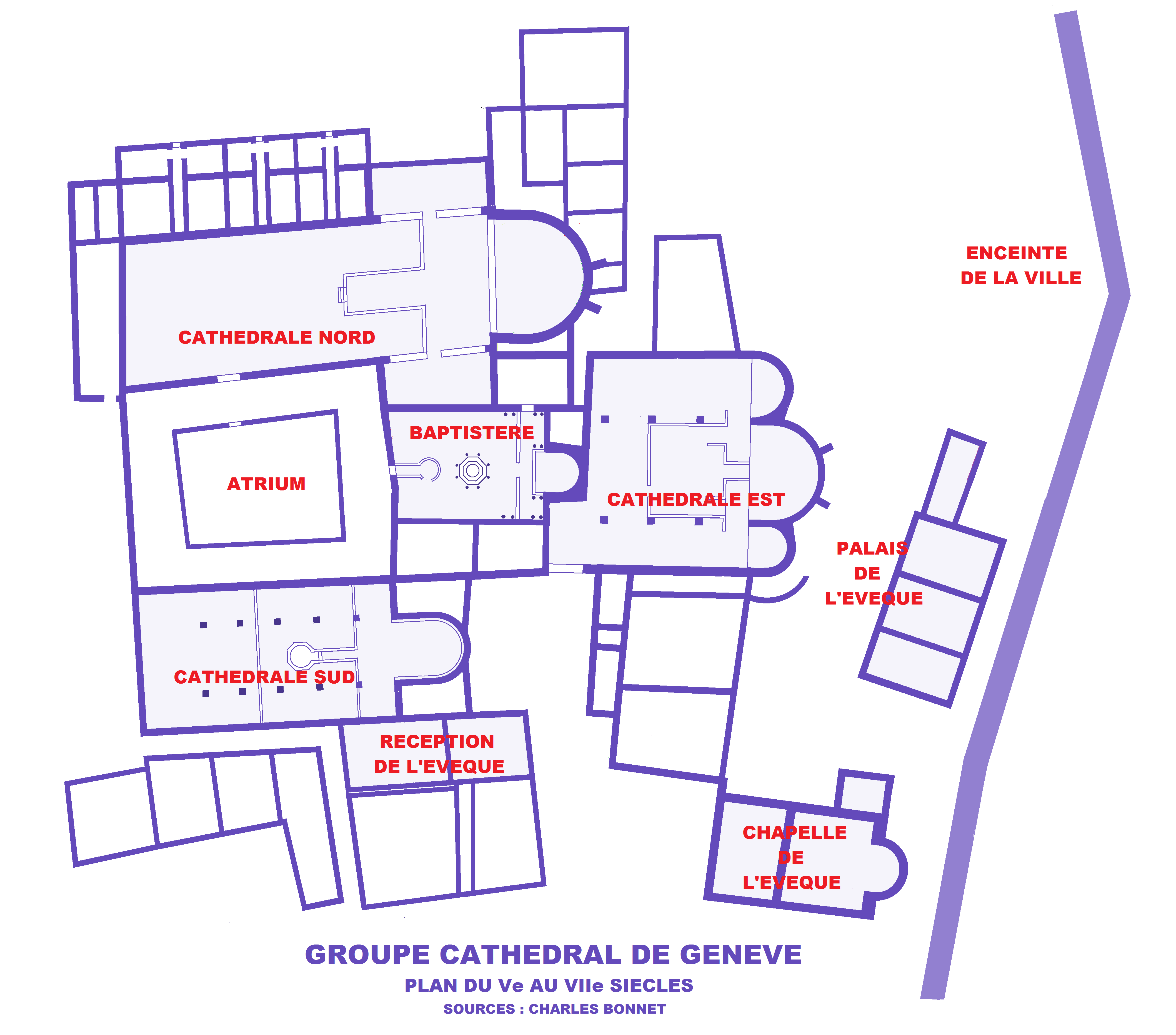 Genève, Groupe cathédral, Plan du Ve au VIIe siècles